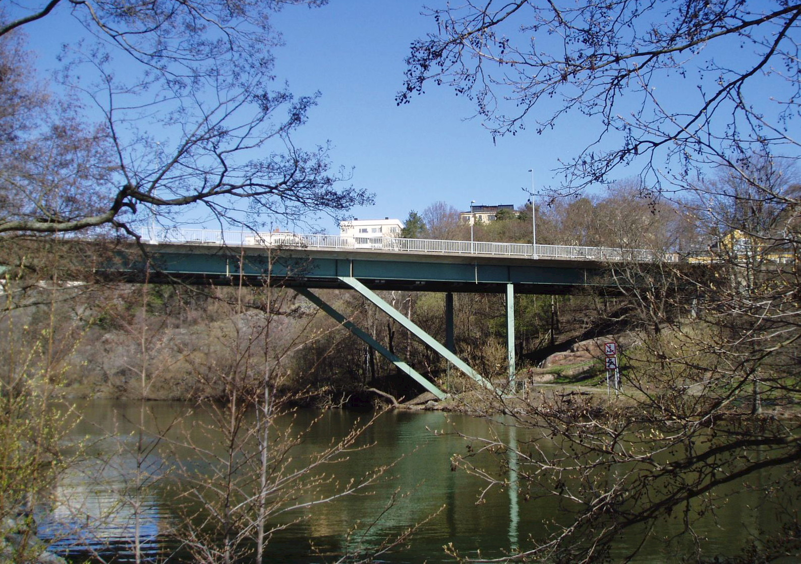 Mariebergsbron, bridge in Stockholm